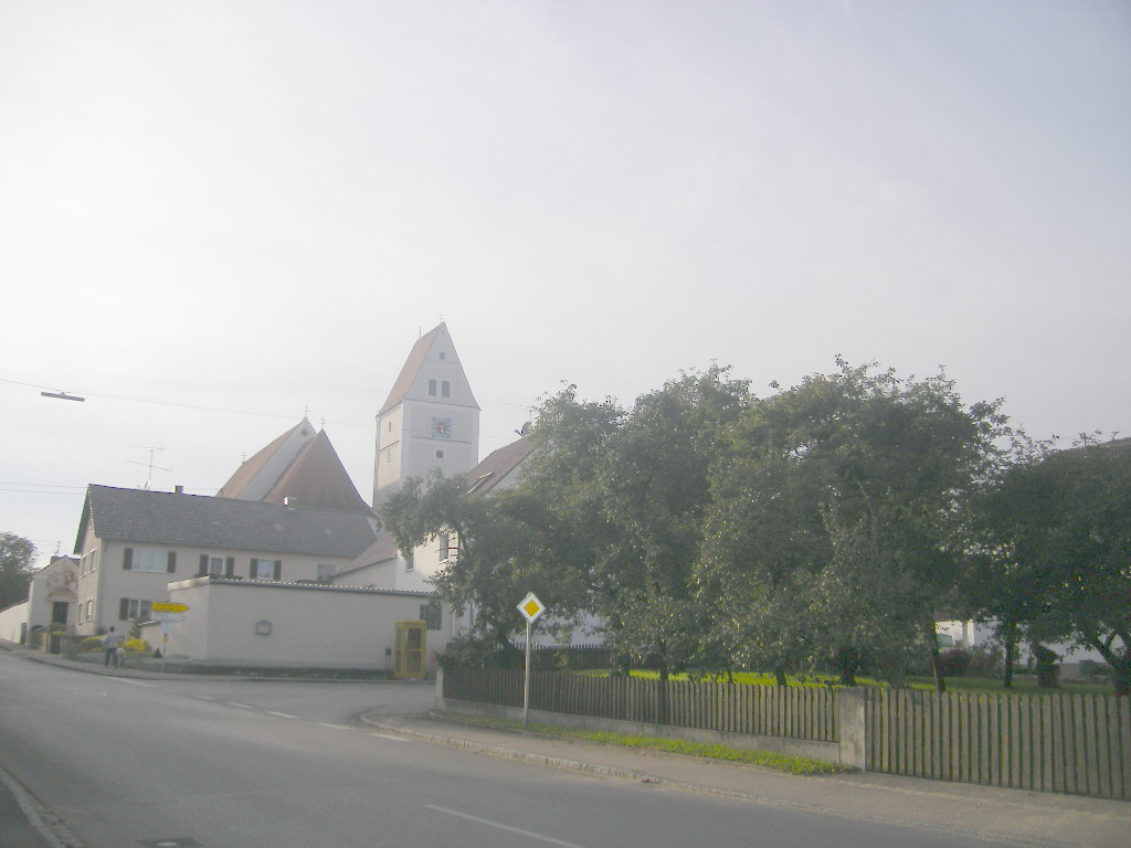 Marxheim